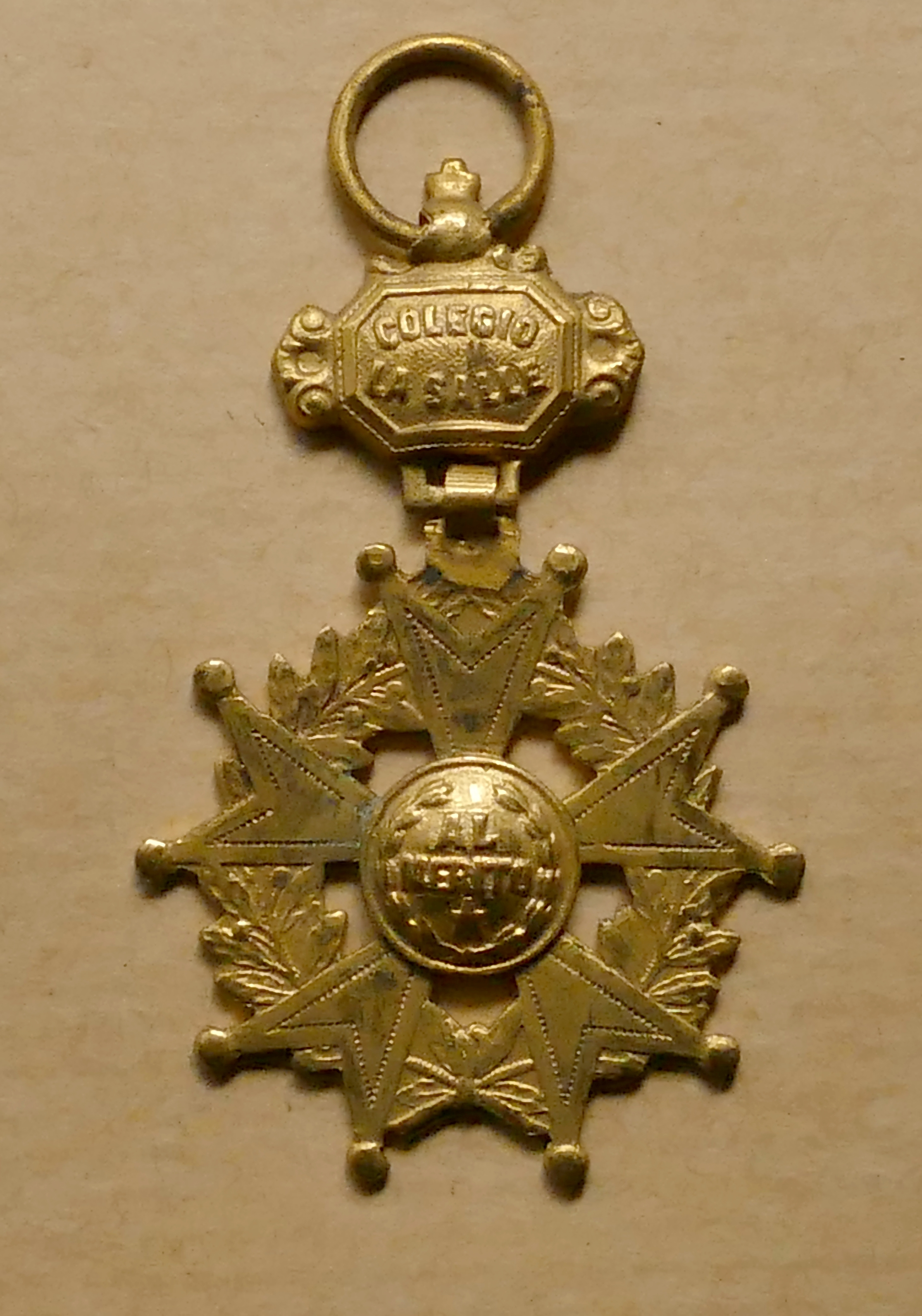 Médaille scolaire "Al Mérito", laiton ou bronze doré, vers 1900, le ruban était rouge. Frères des écoles chrétiennes, Colegio La Salle, origine Espagne, Portugal ou Amérique Latine (?). Revers neutre, hauteur 5,5 cm sans l'anneau. Collection personnelle.